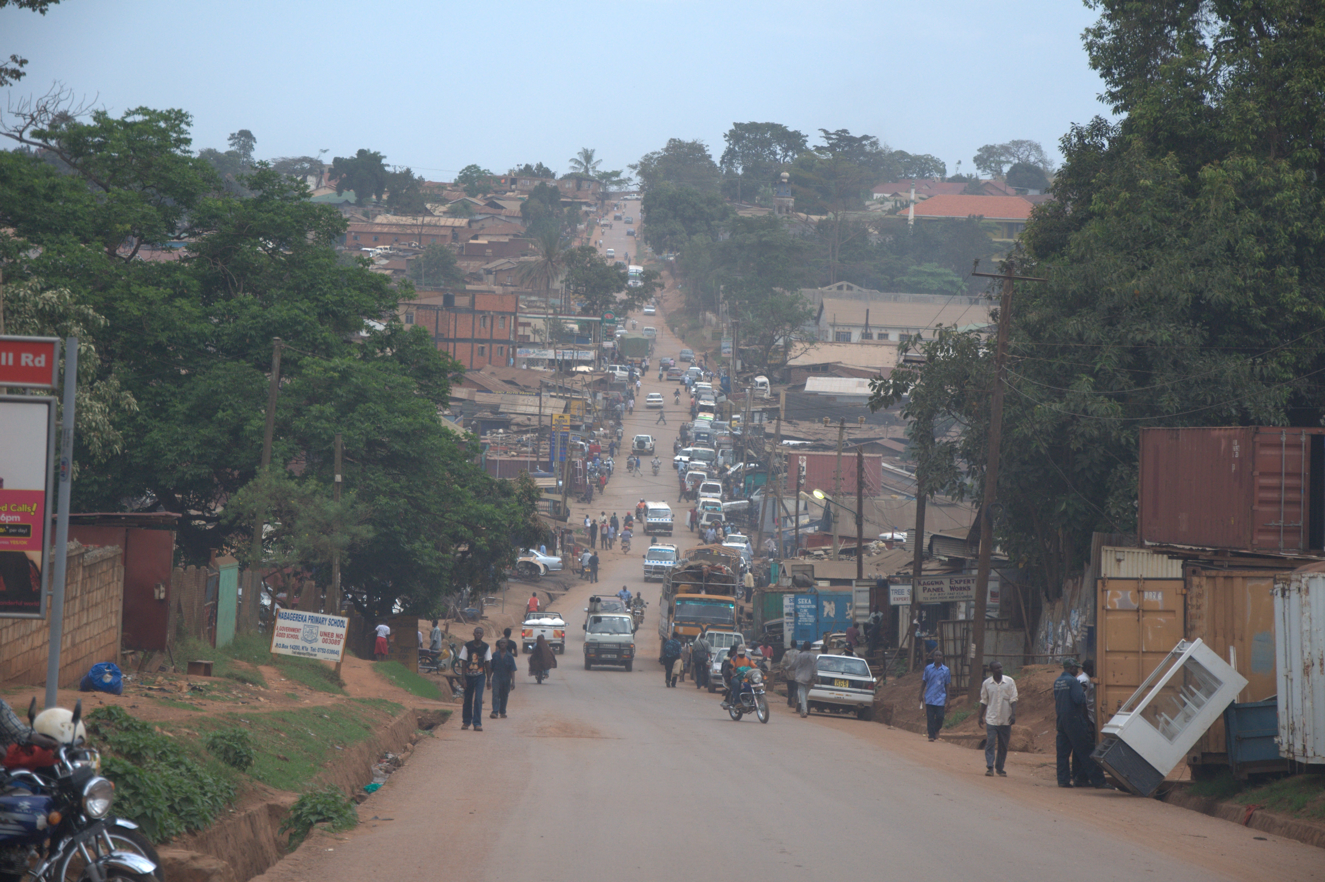 Uganda, Street views in Kampala